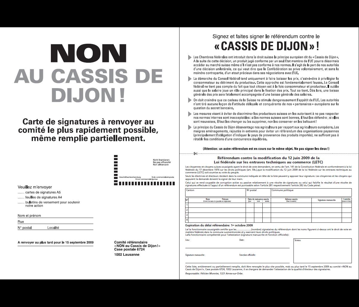 Carte de signatures publiée par la Ligue Vaudoise en 2009 en vue d'un référendum contre l'introduction du principe "cassis de Dijon" en Suisse